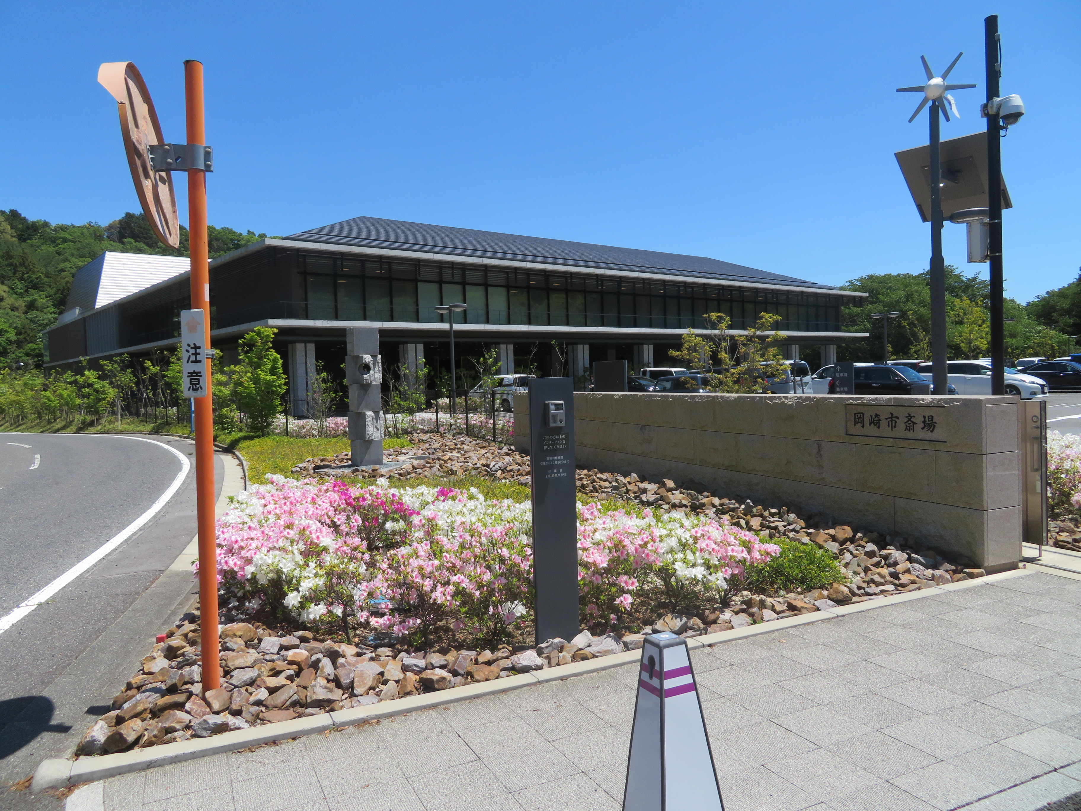 岡崎市斎場（岡崎市才栗町）